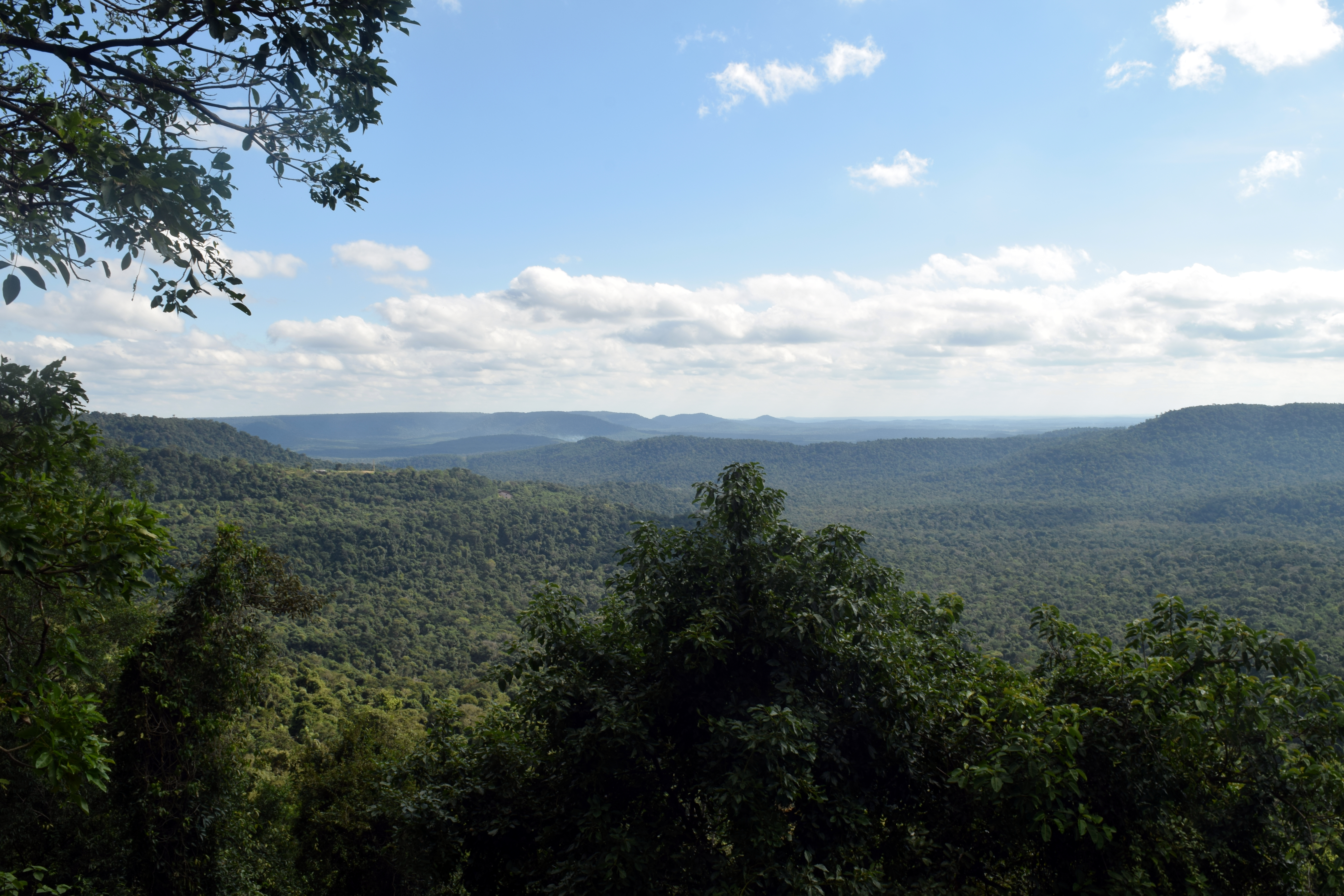 El Parque provincial Salto Encantado visto desde la ruta provincial 7.